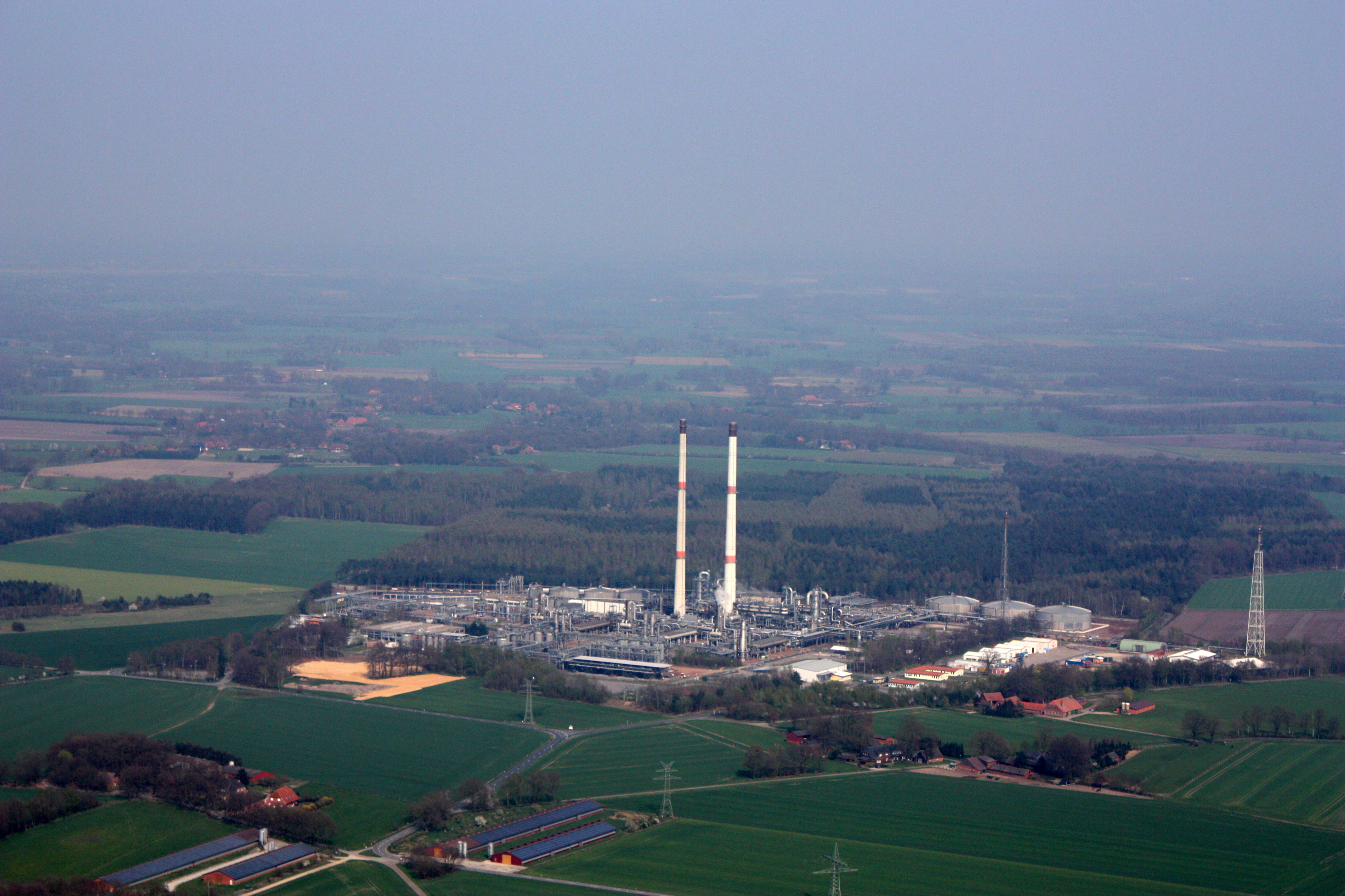 Erdgasaufbereitungsanlage von ExxonMobil in Großenkneten – Wildeshausen, Landkreis Oldenburg, Niedersachsen